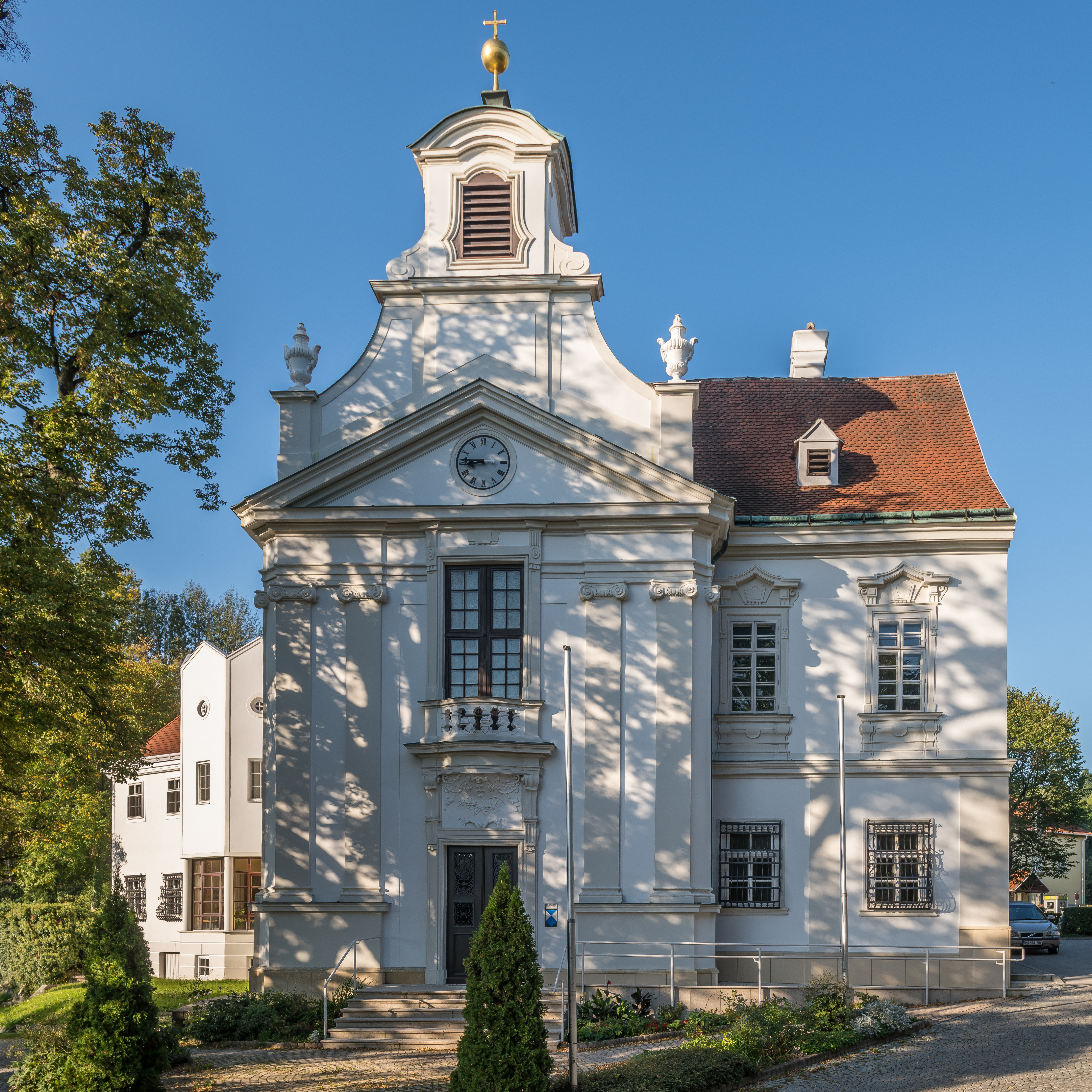 Katholische Pfarrkirche hl. Johannes Nepomuk Breitenfurt bei Wien